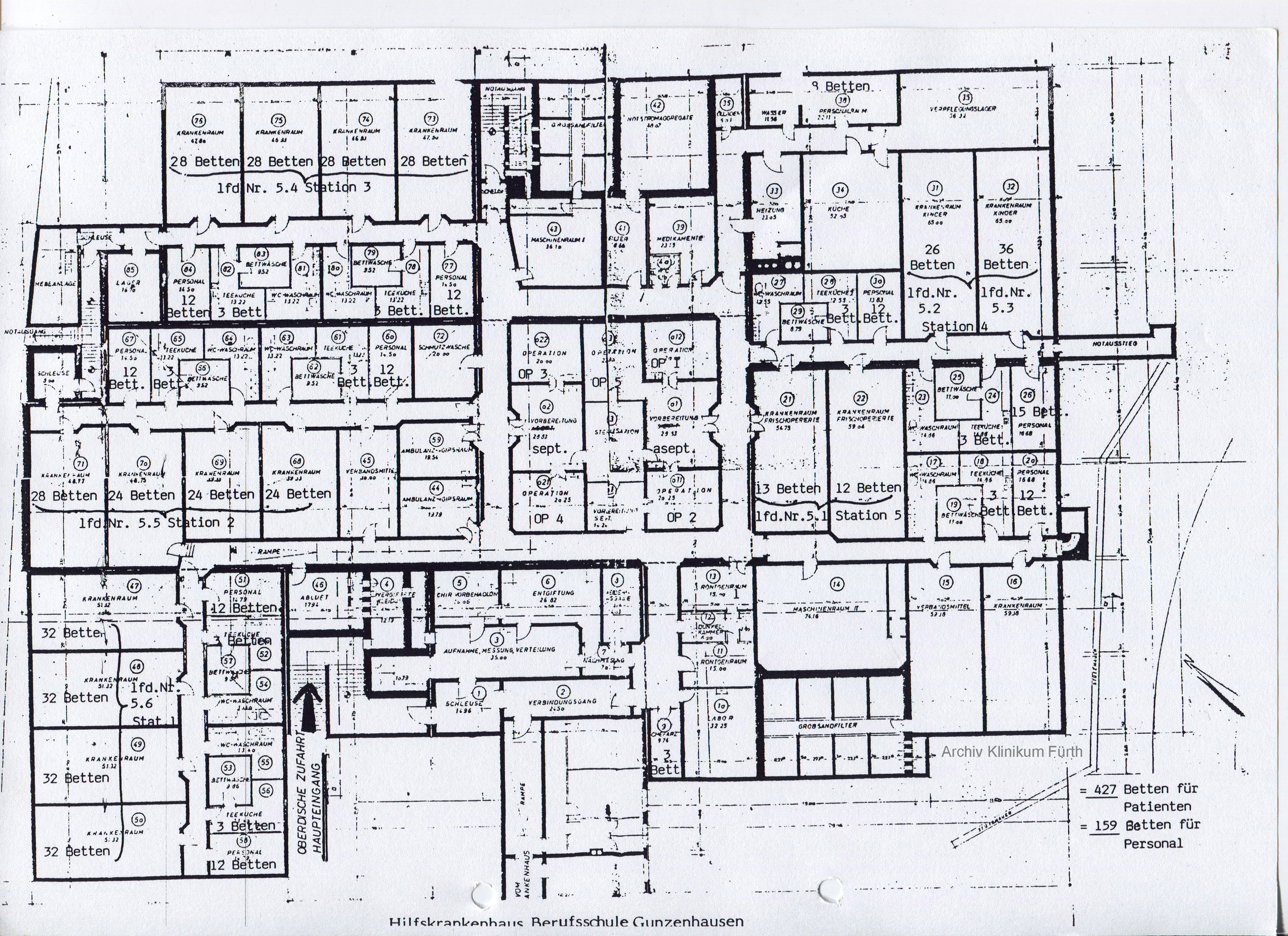 Grundriss des Hilfskrankenhauses Gunzenhausen unterhalb der Berufsschule